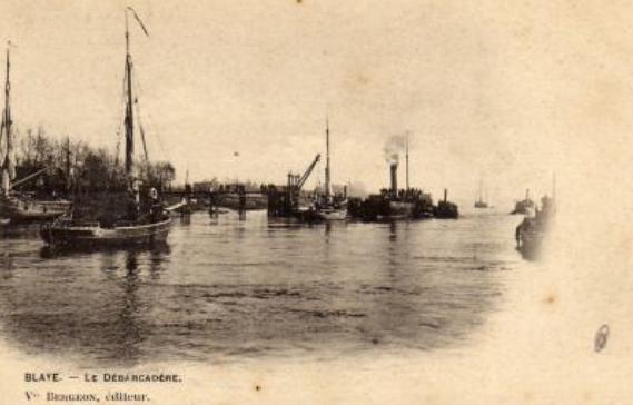 Blaye, Débarcadère